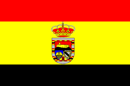 Bandera de Puebla de Alcocer, en Badajoz (España)